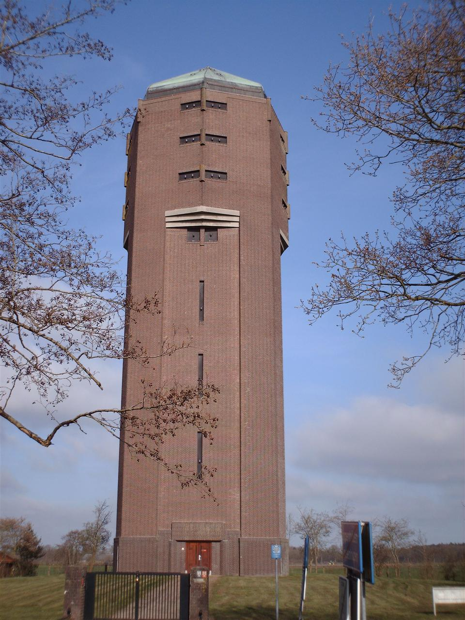 Watertoren in Lippenhuizen